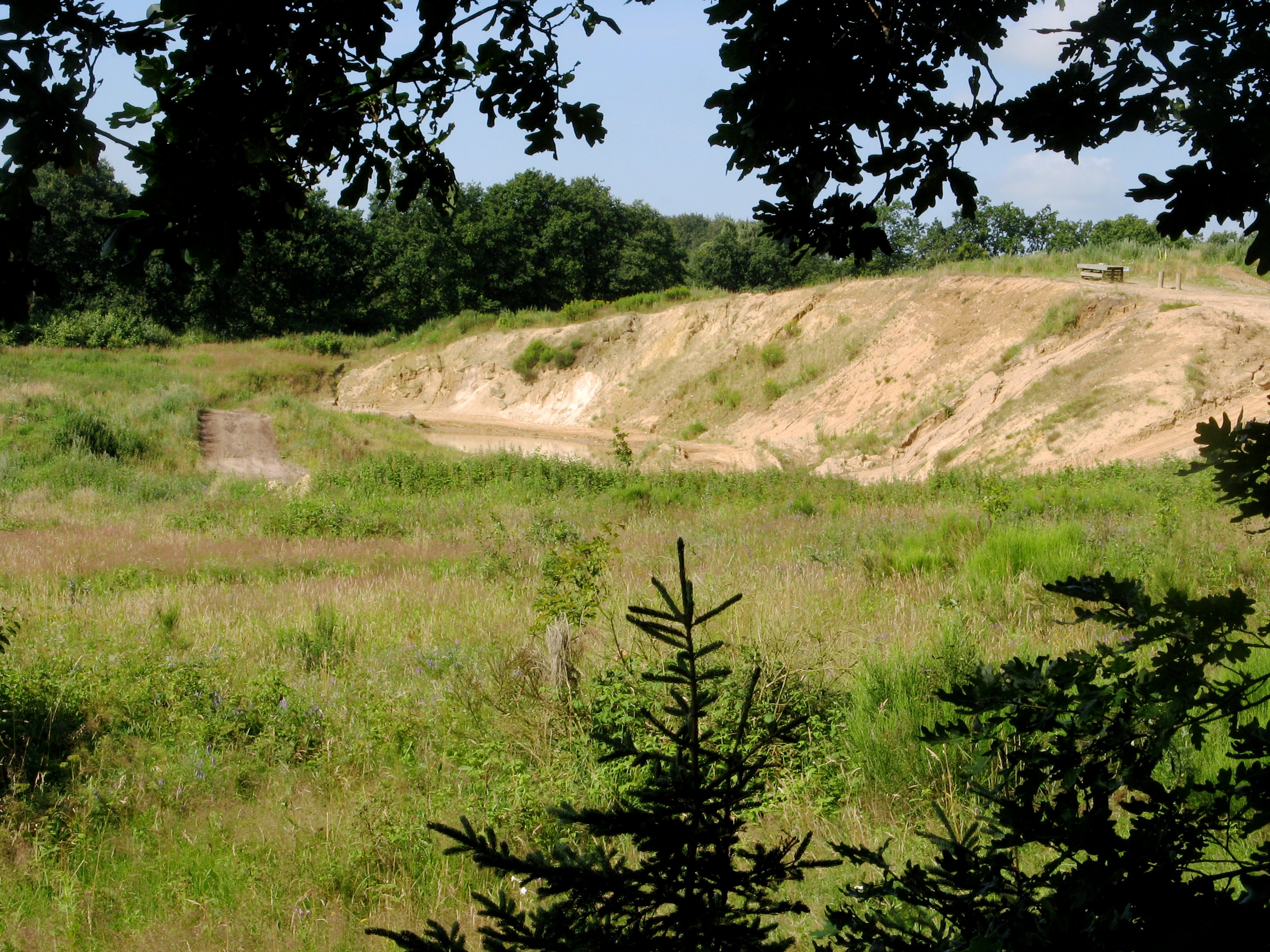 Hohe Geest in Westerau, part of Bunsoh